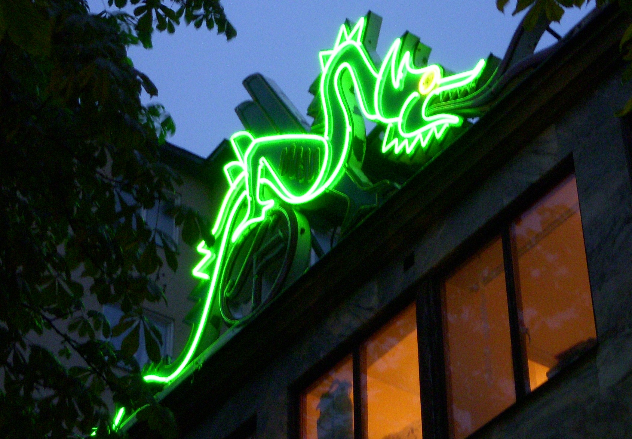 Lysreklam till biografen "Draken"